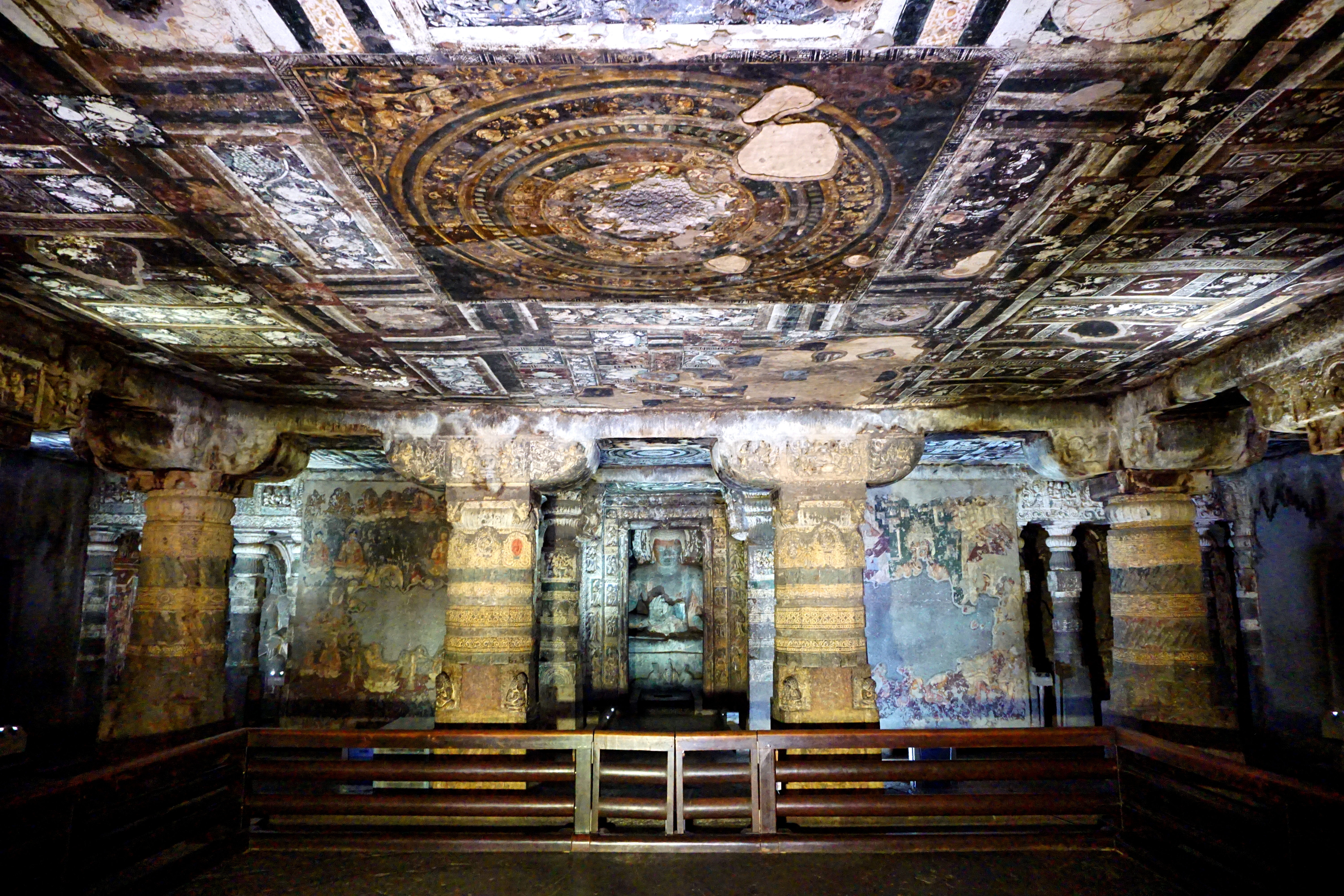 Ajanta Caves, Aurangabad, India